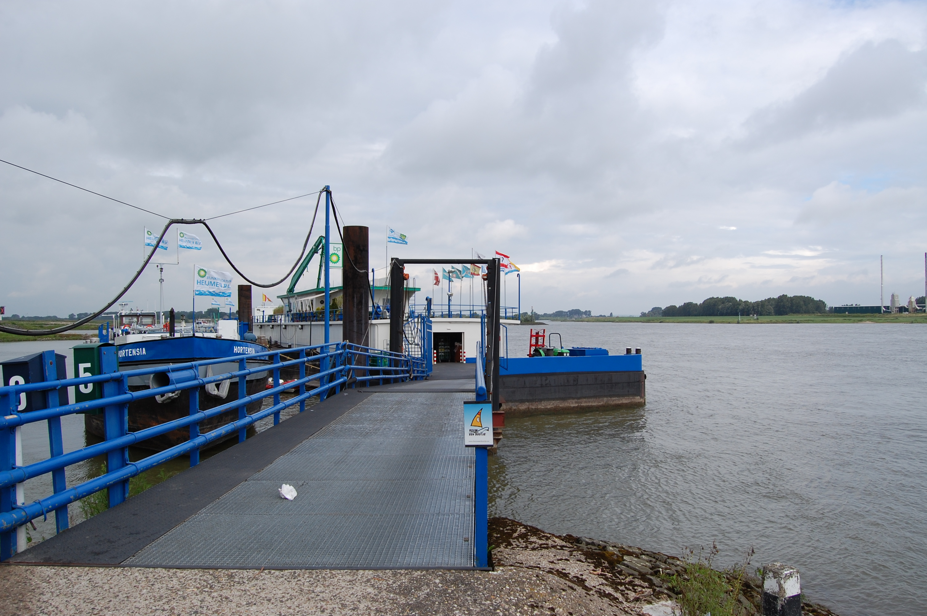 Een bunkerschip gelegen in de Rijn ter hoogte van Millingen aan de Rijn.